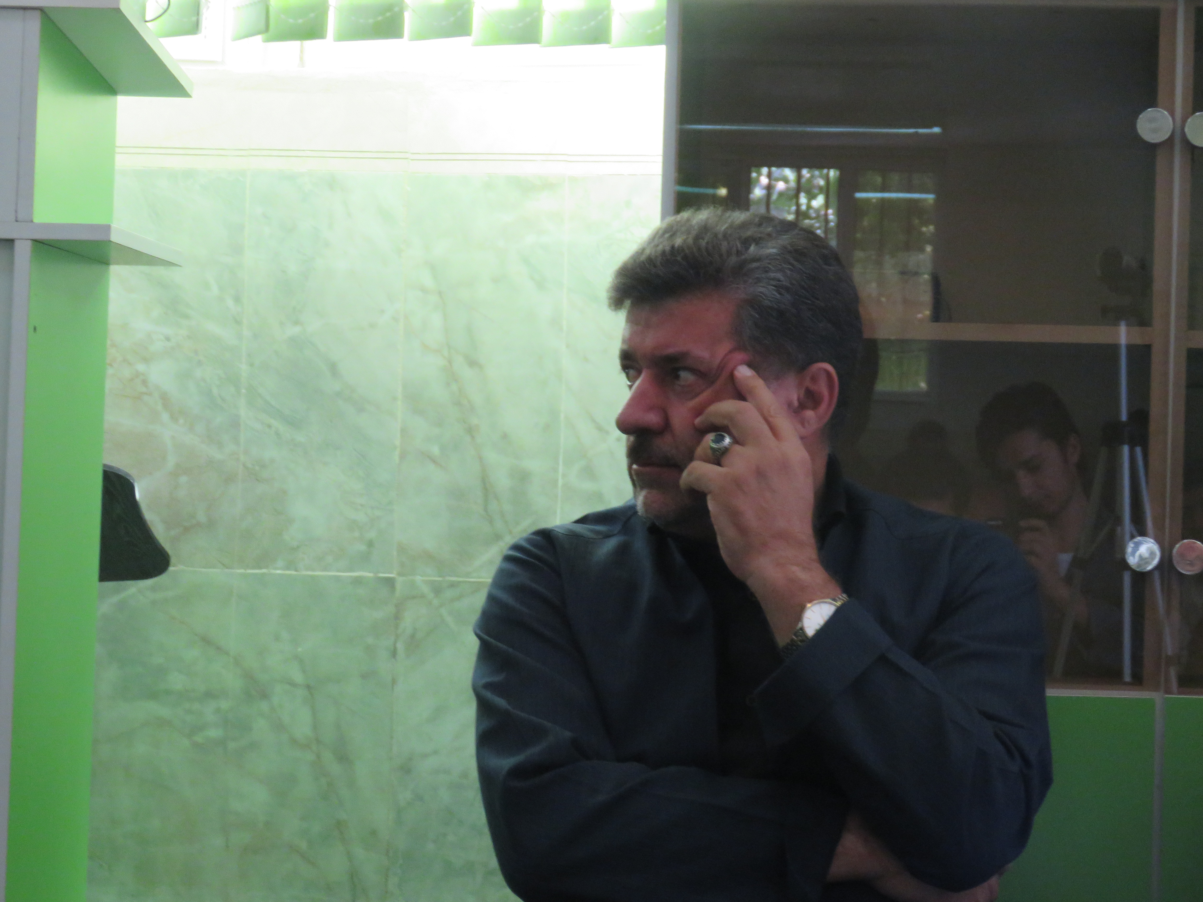 تصویری از سید فتح‌الله حسینی نمایندهٔ حوزهٔ انتخابیهٔ پاوه، جوانرود، روانسر و ثلاث باباجانی در دورهٔ چهارم و هشتم مجلس شورای اسلامی، در مراسم ختم و تشییع خالو حسین کوهکن، که به مدت ۲ روز در مسجد صلاح‌الدین ایوبی شهر بانه‌وره برگزار شد. (مکان: مسجد صلاح‌الدین ایوبی شهر بانه‌وره از توابع استان کرمانشاه.)